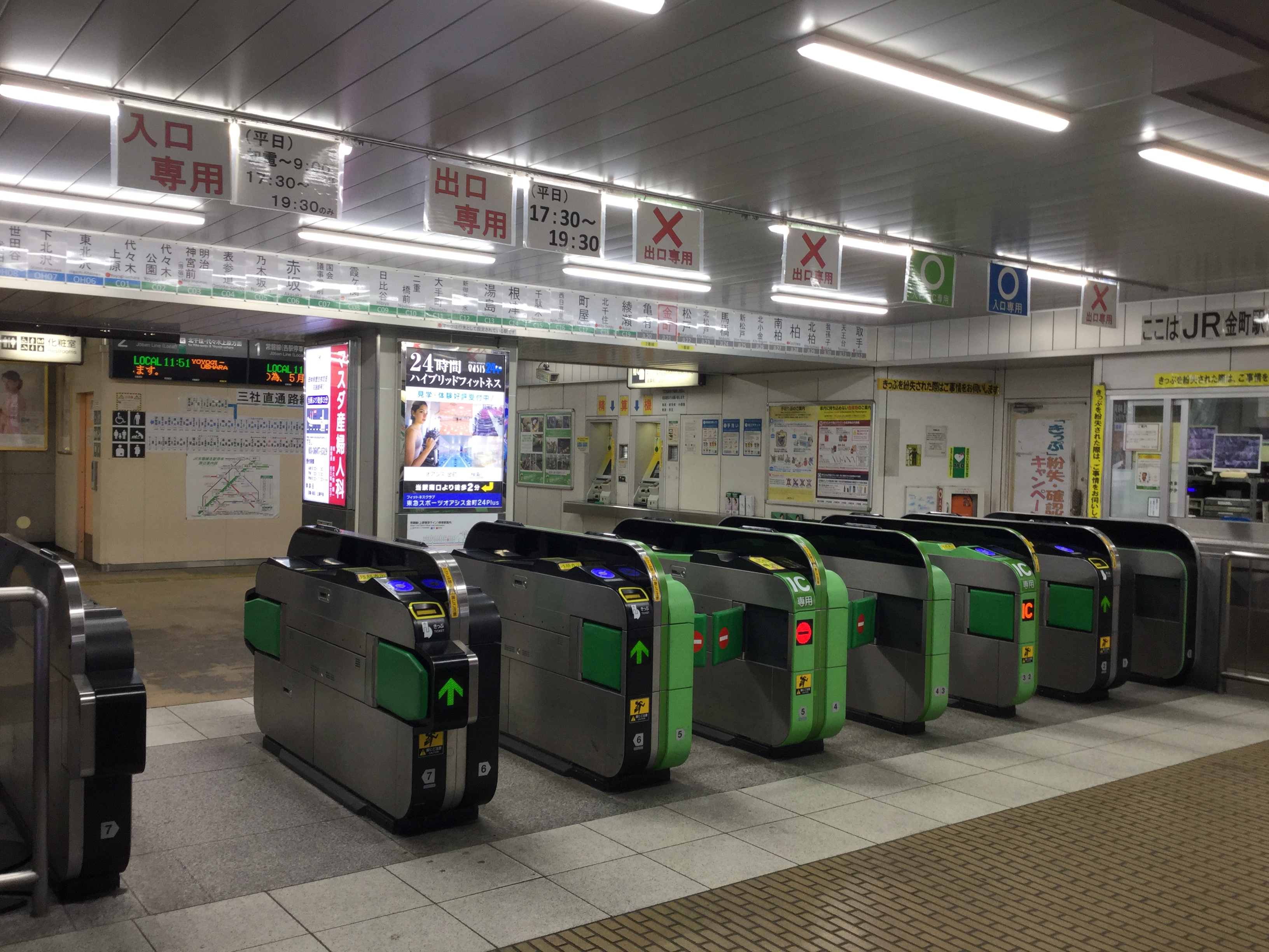 金町駅改札口